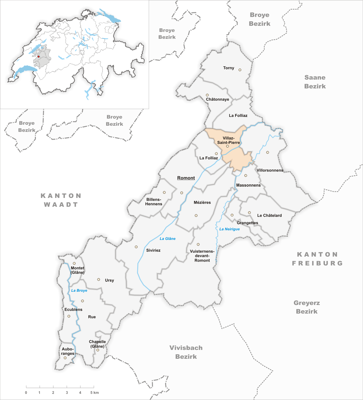 Municipality Villaz-Saint-Pierre